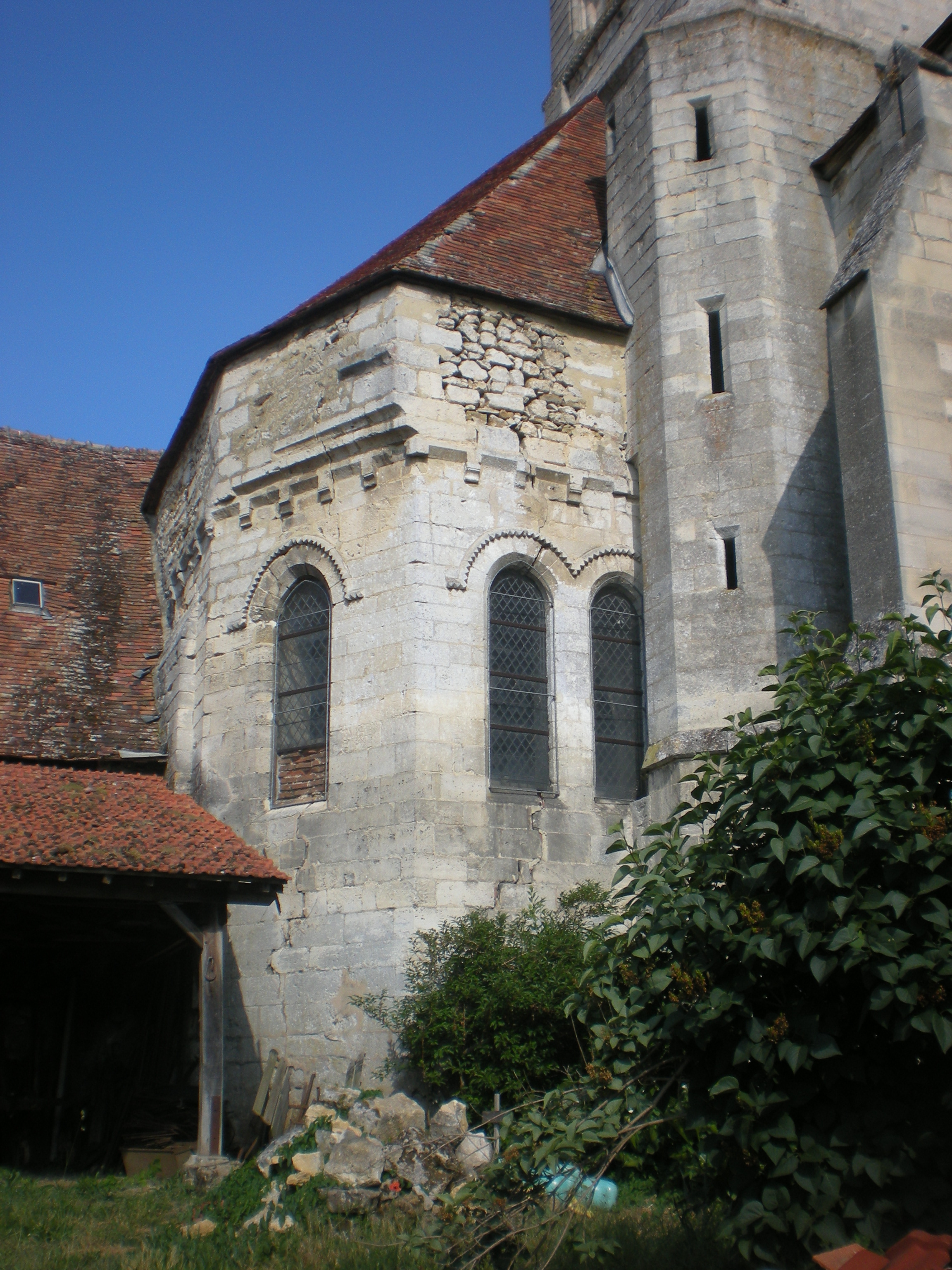 l'église st martin